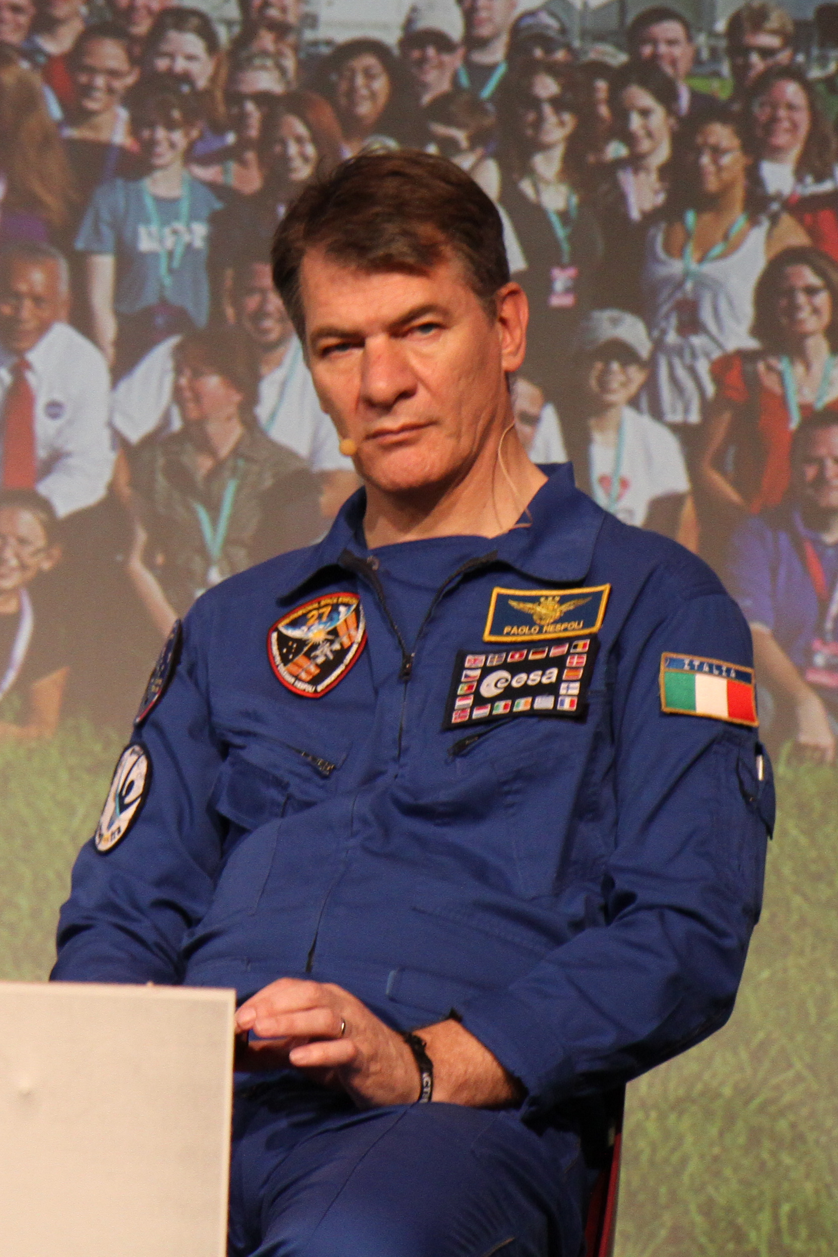 Paolo Nespolis talk "Twittern aus dem All für die digitale Öffentlichkeits­arbeit"